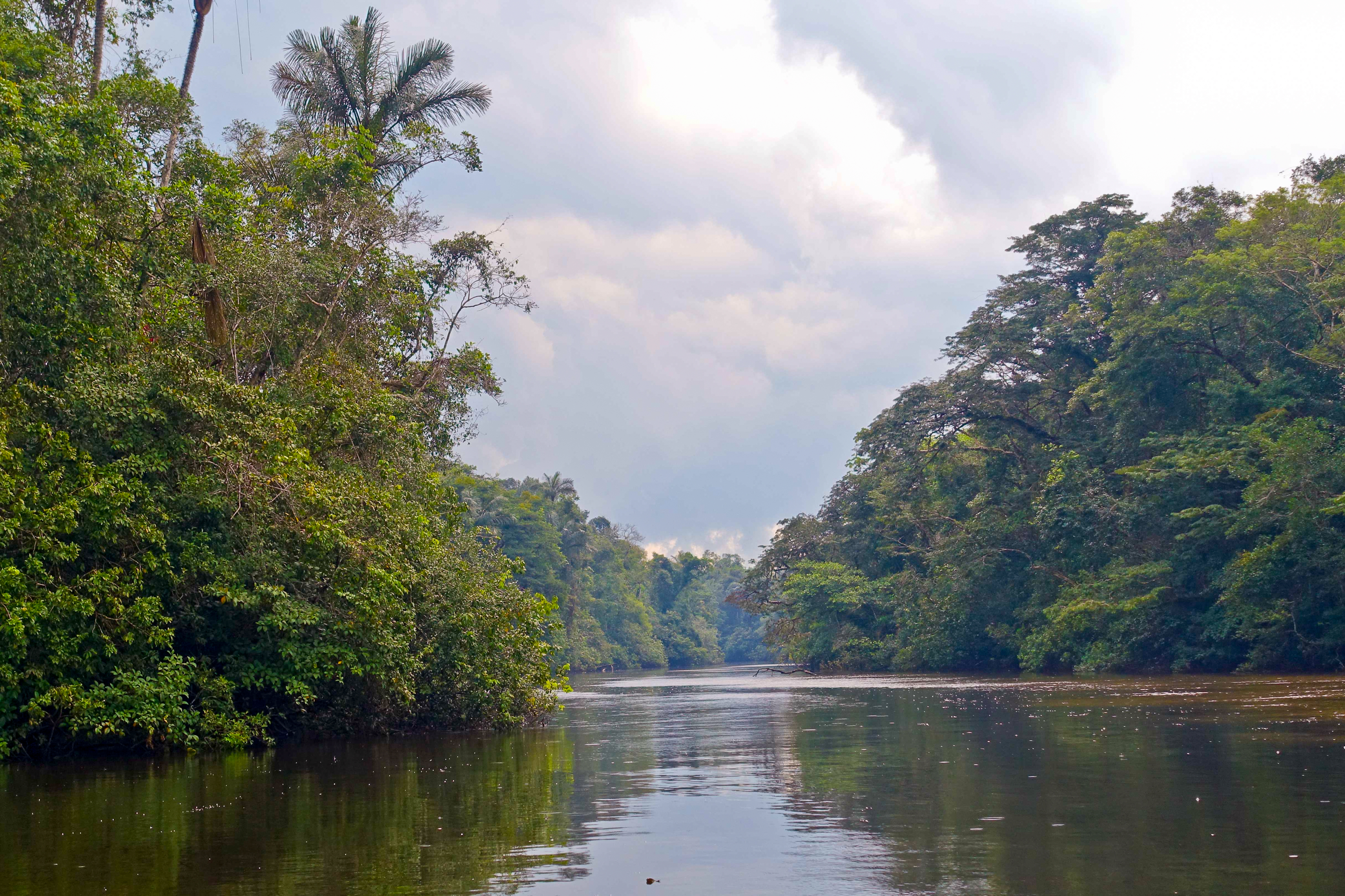 Regenwald in Ecuador am Río Cuyabeno, nahe Laguna Grande